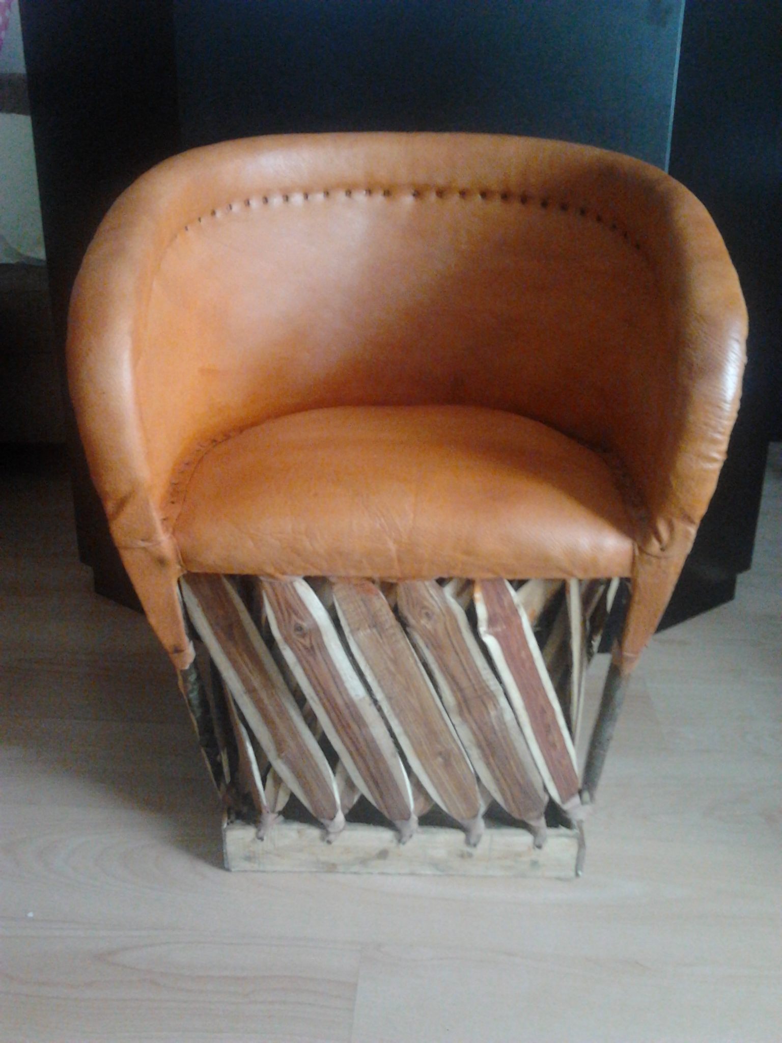 asiento artesanal de piel